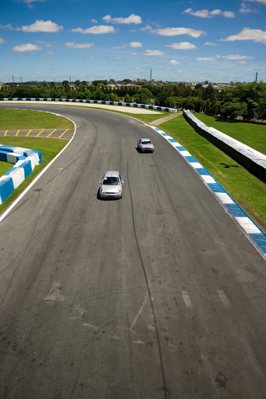 TrackDay em Curitiba